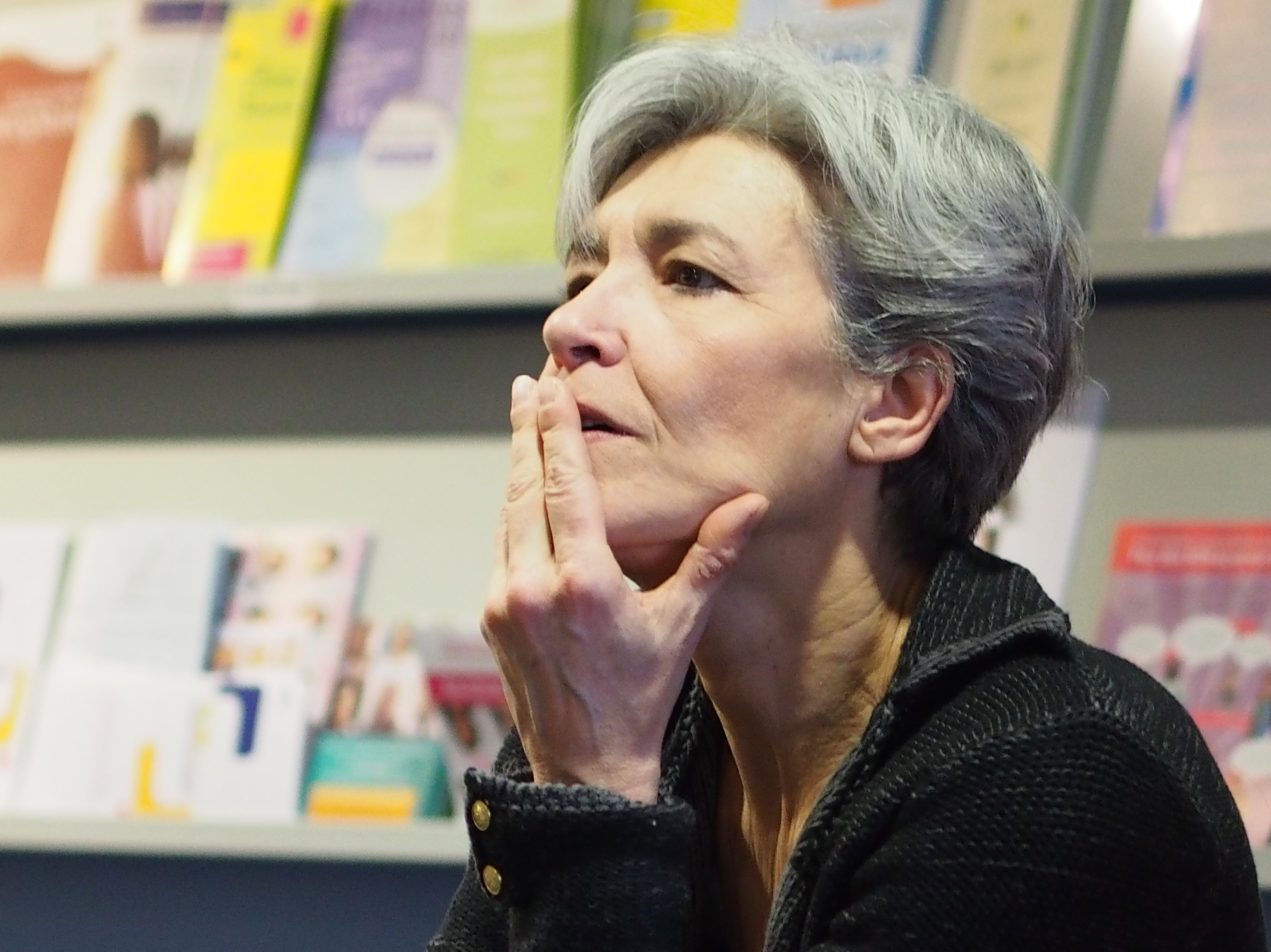 Claudie Haigneré lors de la journée « Femmes de science sur Wikipédia », le 1er février 2014, à la Cité des sciences et de l'industrie (Paris, France).